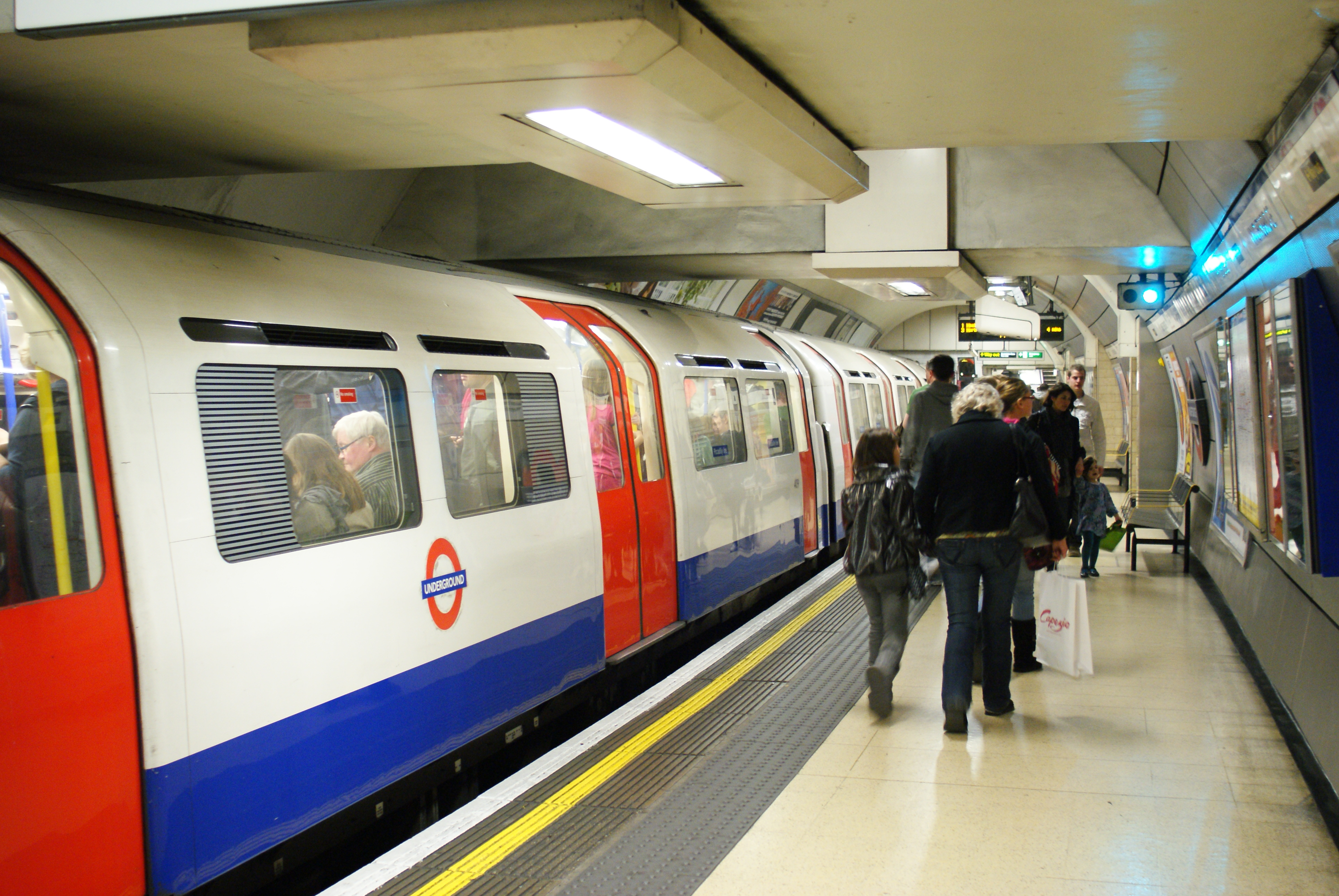 KNIGHTSBRIDGE-1 261009 CPS